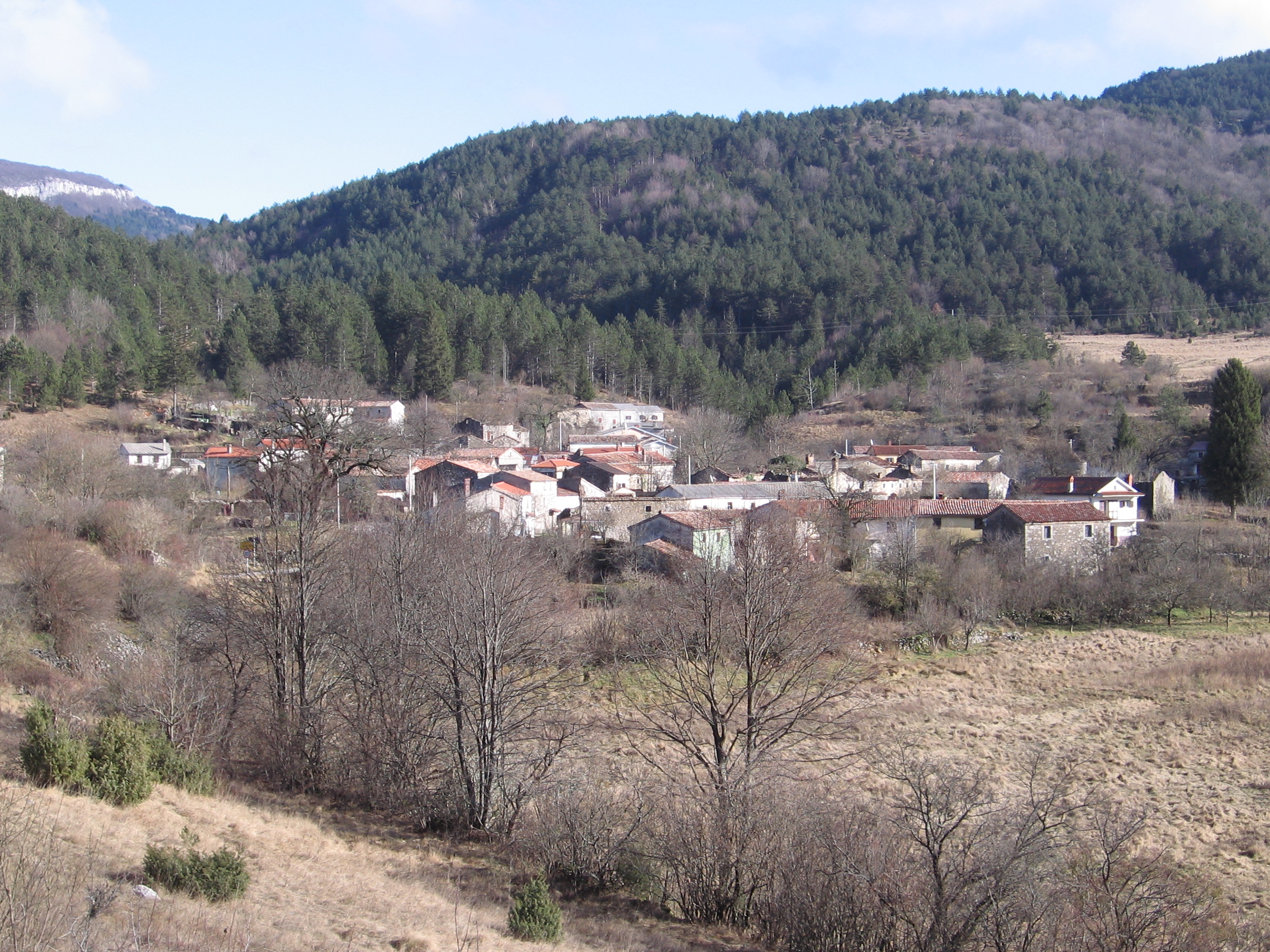 Dane (Lanišće)